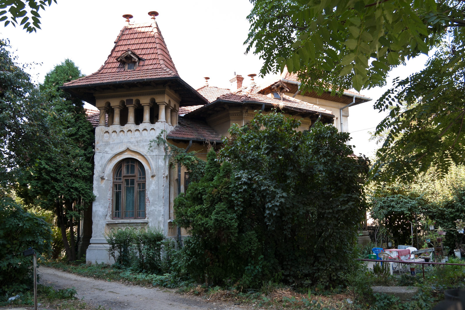 Fotografia prezinta casa Bobancu de pe str. Brătianu I.C. 51, vazuta dinspre E.